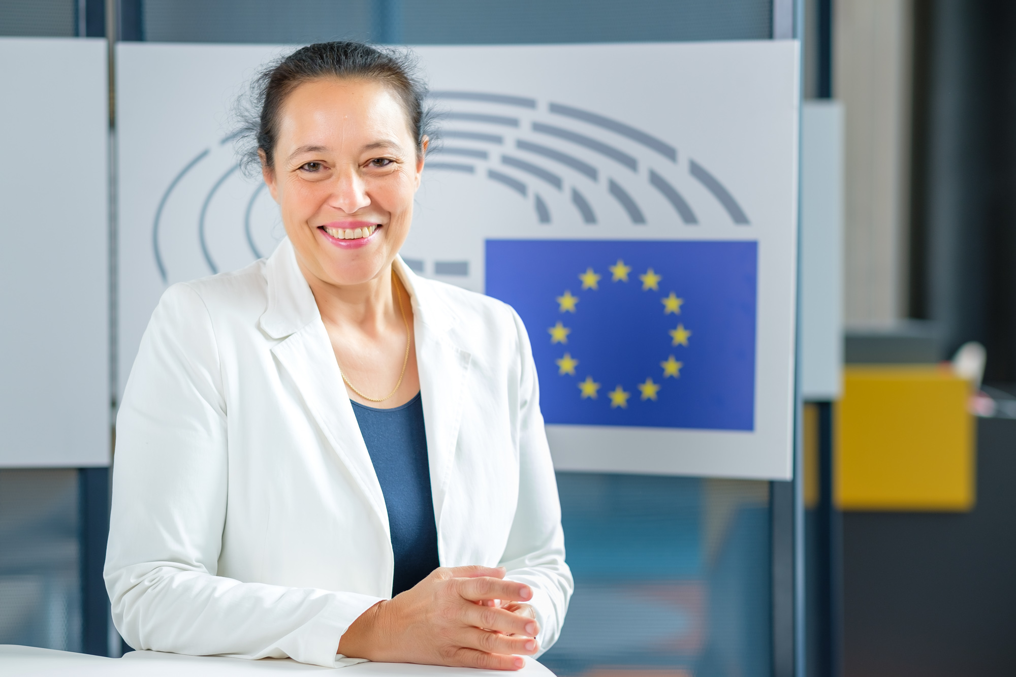 Isabel Wiseler-Lima, Députée européenne